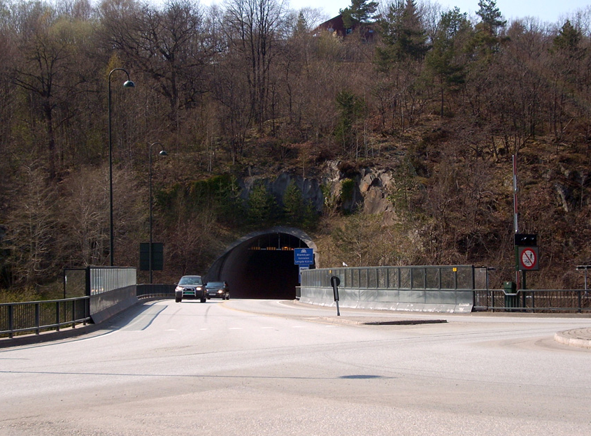 Blødekjærtunnellen i Arendal, inngang øst.